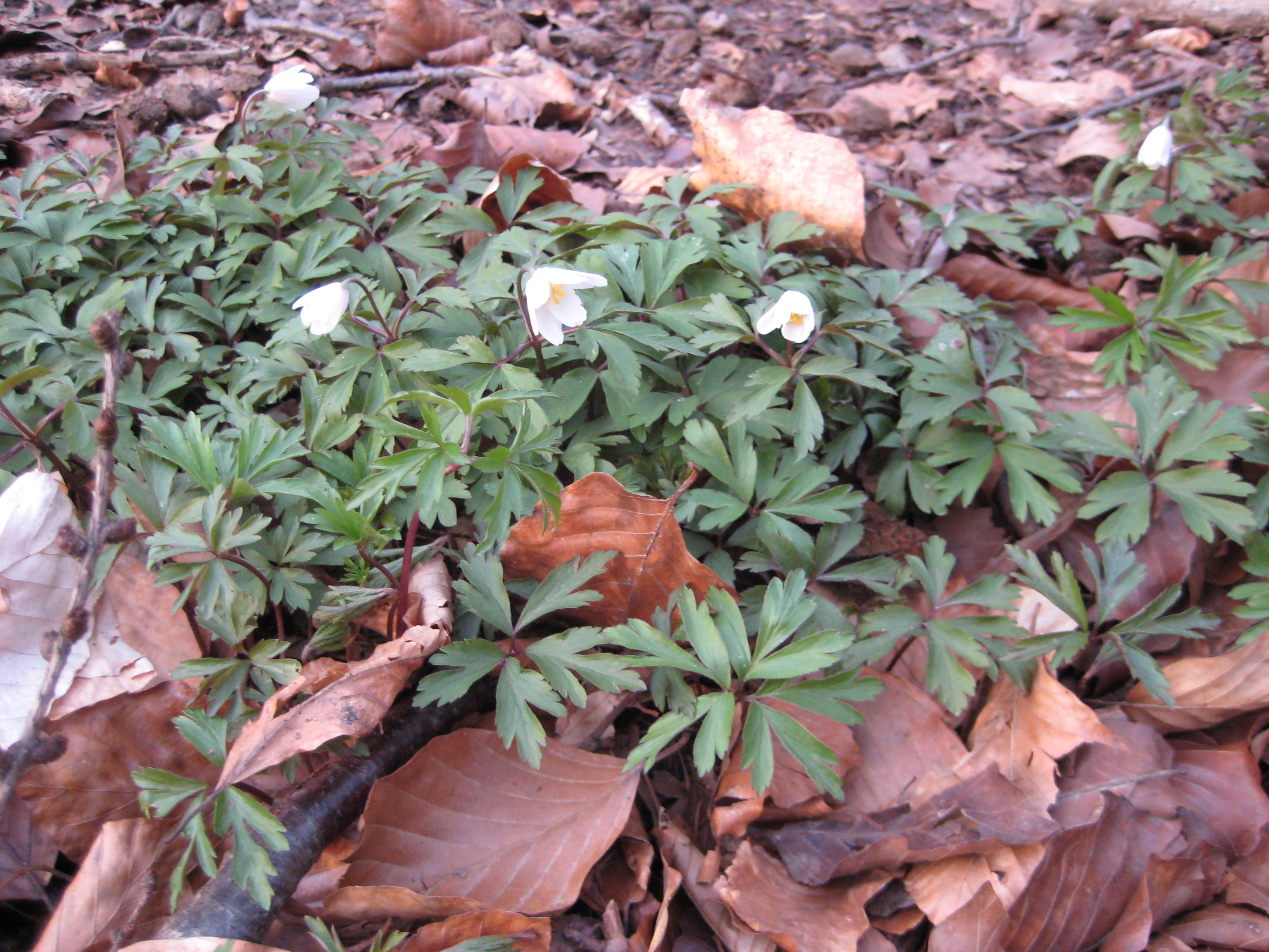 Frühblüher Buschwindröschen am Kleinen Freeden März 2008